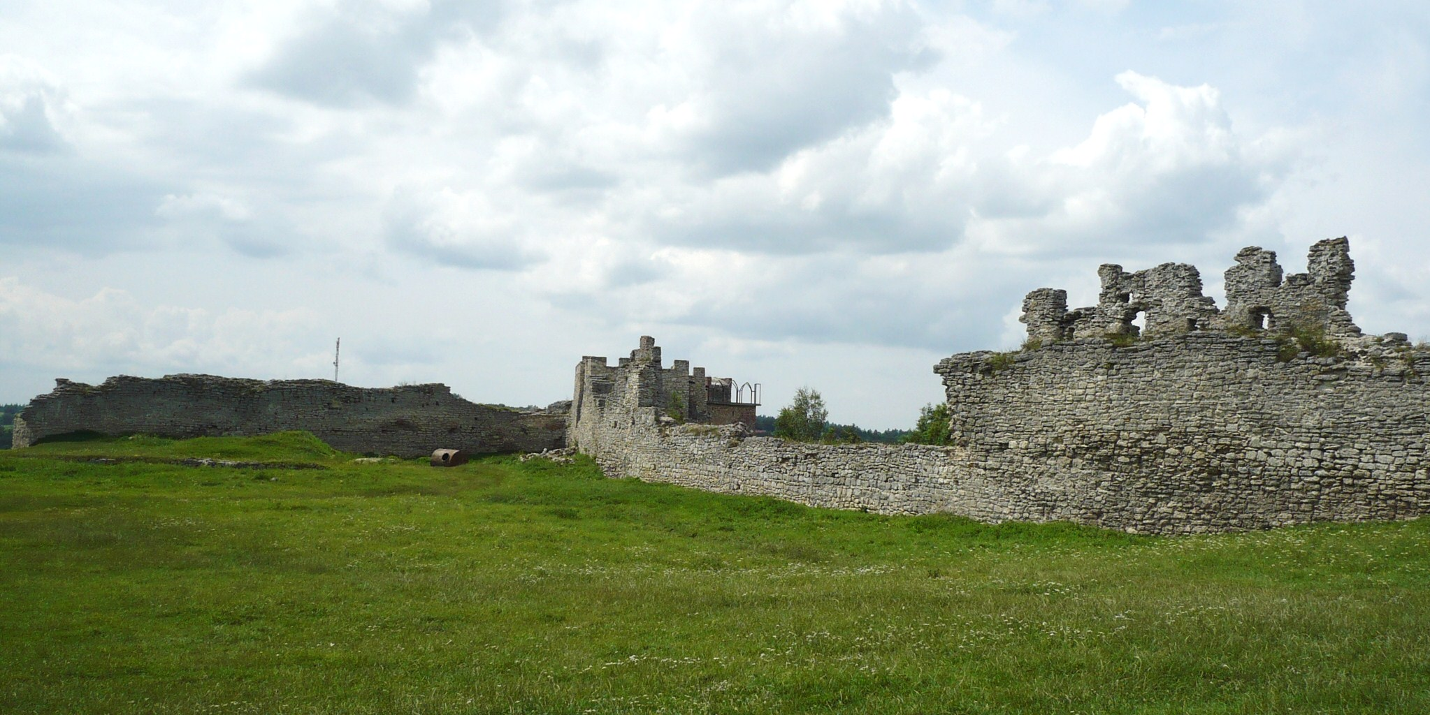 Zamek w Krzemieńcu